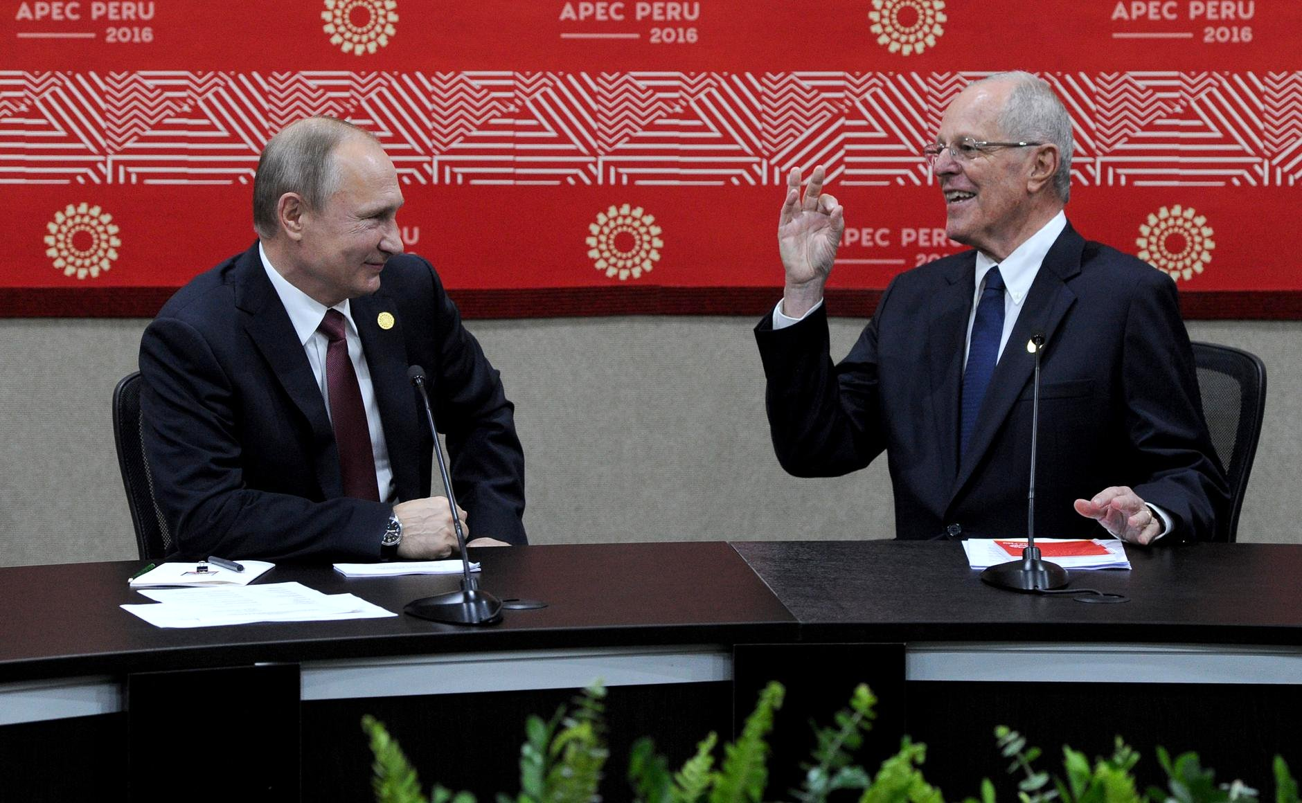 Встреча Президента России Владимира Путина и Президента Республики Перу Педро Пабло Кучински